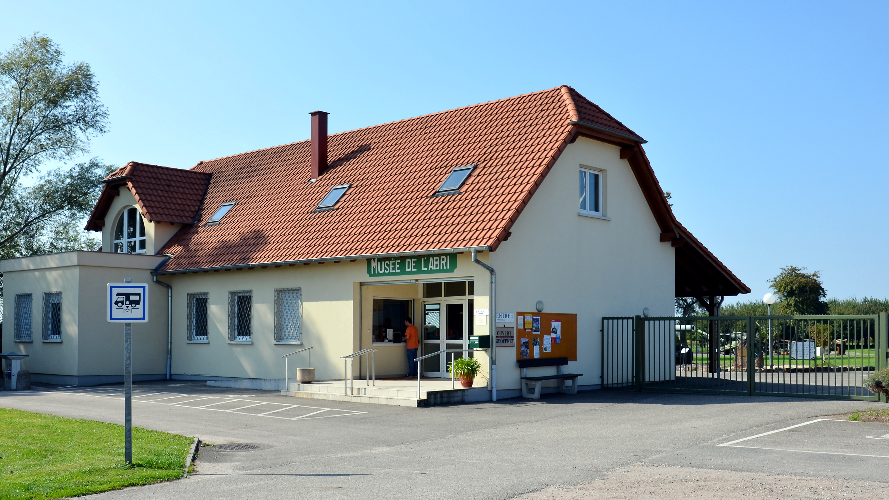 Großunterstandsmuseum in Hatten (Bas-Rhin)